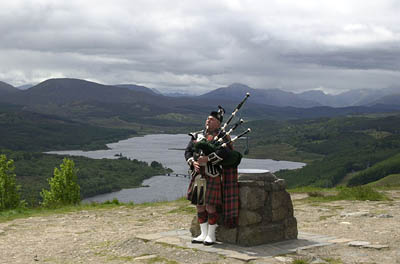 Beschreibung: Schottland Highland Loch Garry Quelle: aufgenommen 11 Juni 2001 Fotograf : Bleiglass Material: Nikon D1, 24-120mm (52mm/F10/1/350sec) Lizenzstatus: GNU FDL